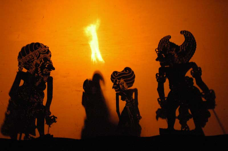 wayang_kulit_1 Tags by Rebecca Marshall: Bali, Ubud, Wayang, Hanuman, Wayan, Wajang Ramayana play, Hindu arts in Bali Indonesia, Hinduism